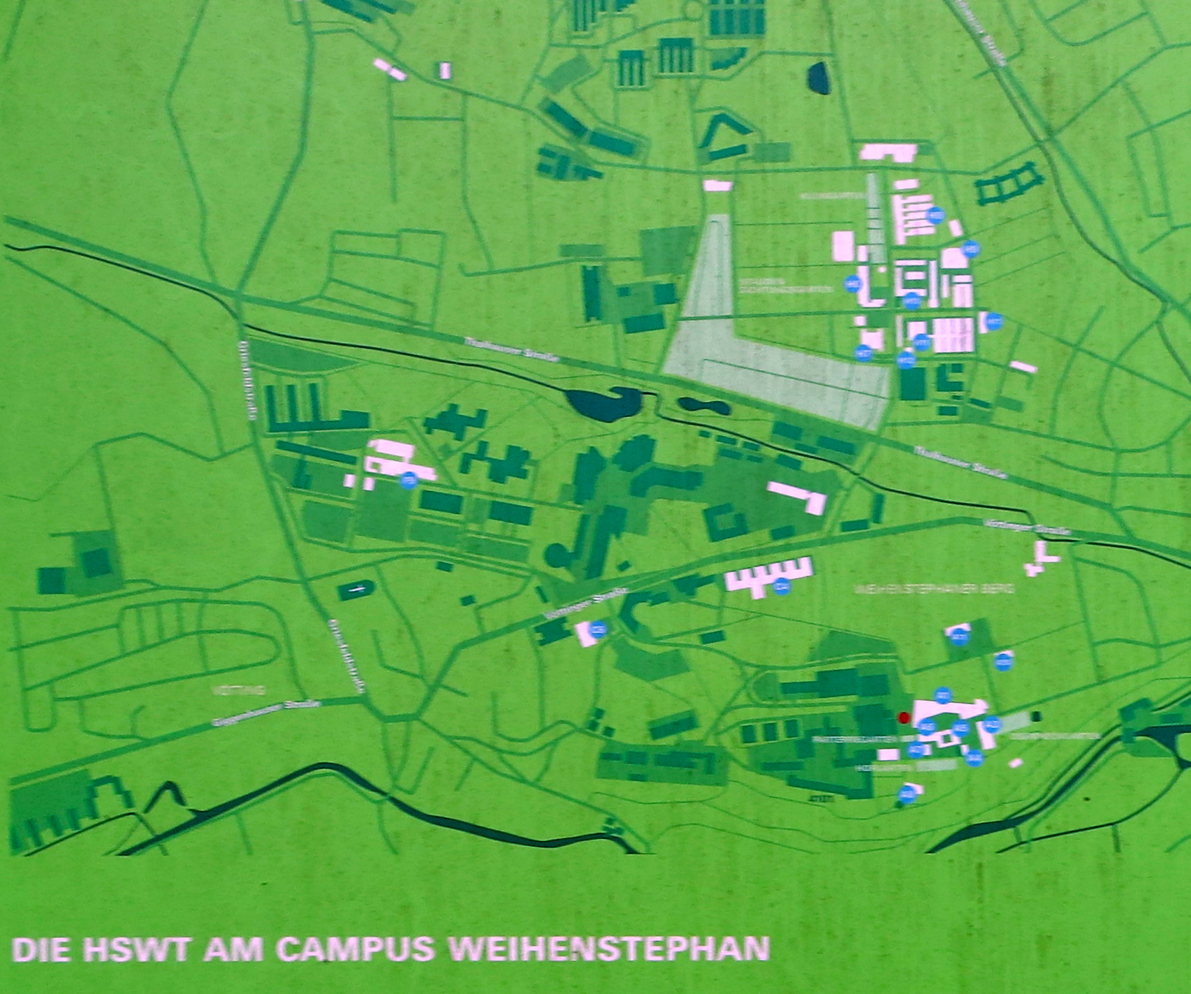 Übersichtsplan